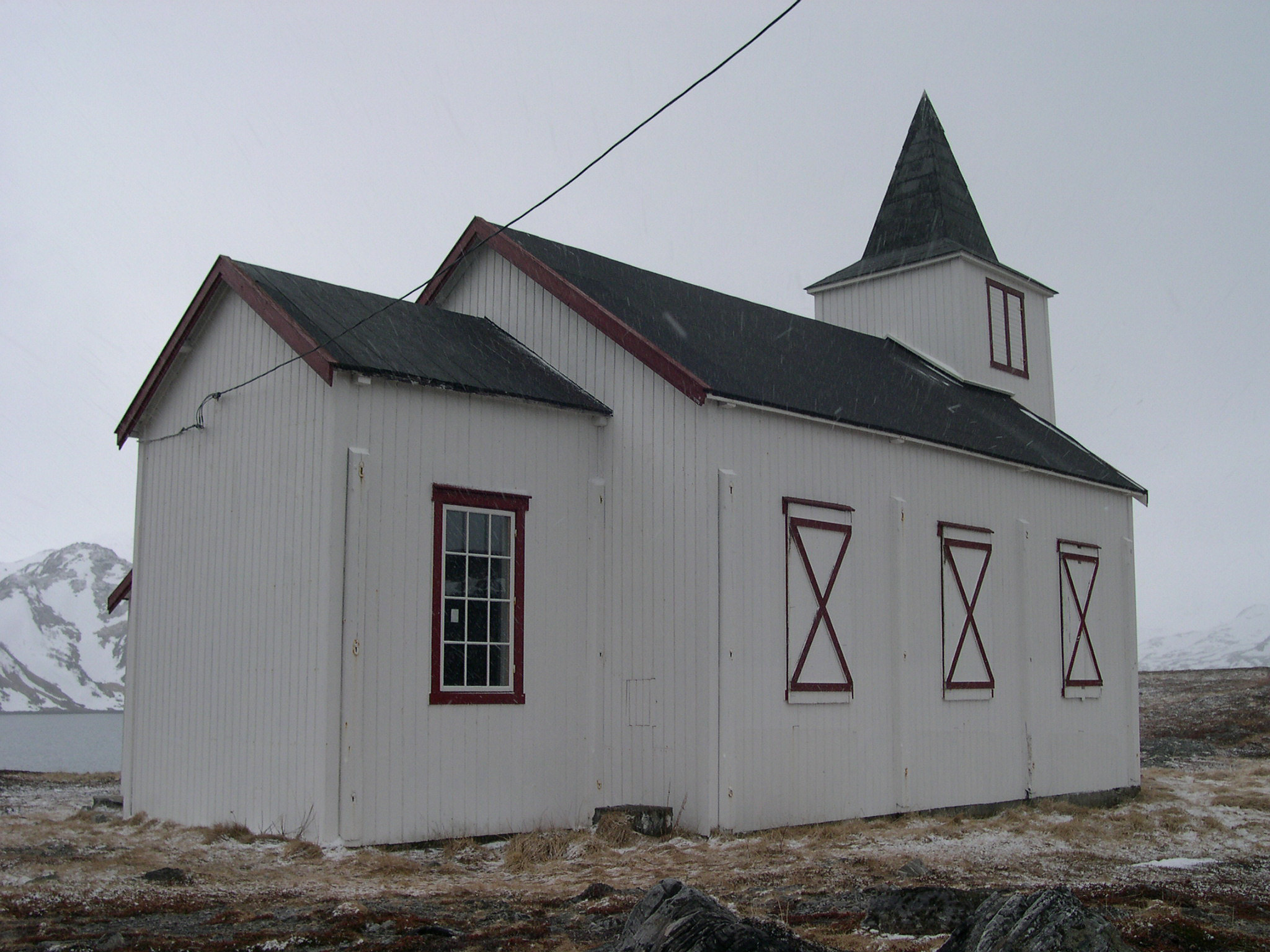 Dønnesfjord kirke. Foto: Oddbjørn Sørmoen, fra Riksantikvarens Kulturminnebilder.